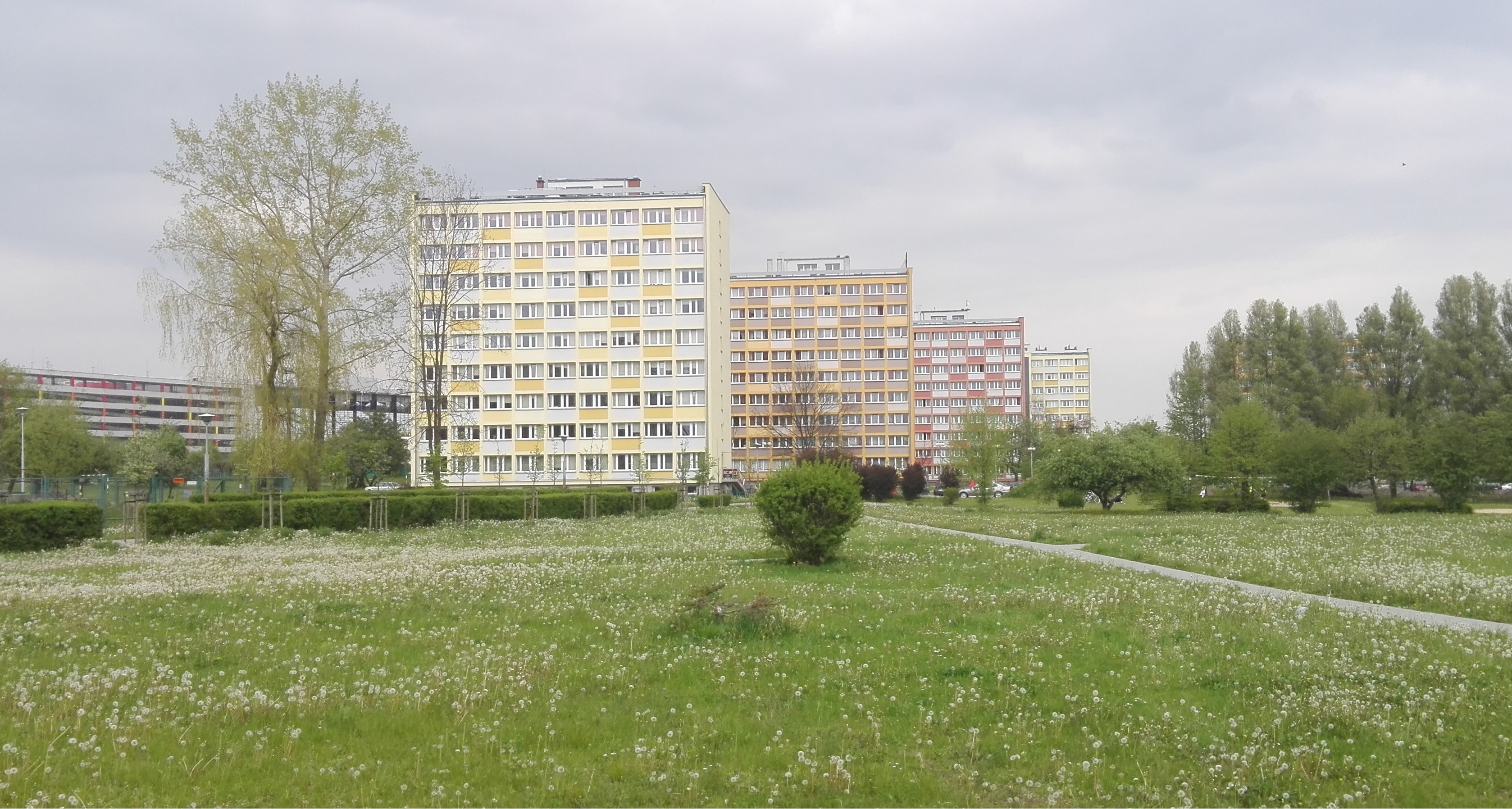 Akademiki Politechniki Świętokrzyskiej przy ul. Tysiąclecia Państwa Polskiego w Kielcach